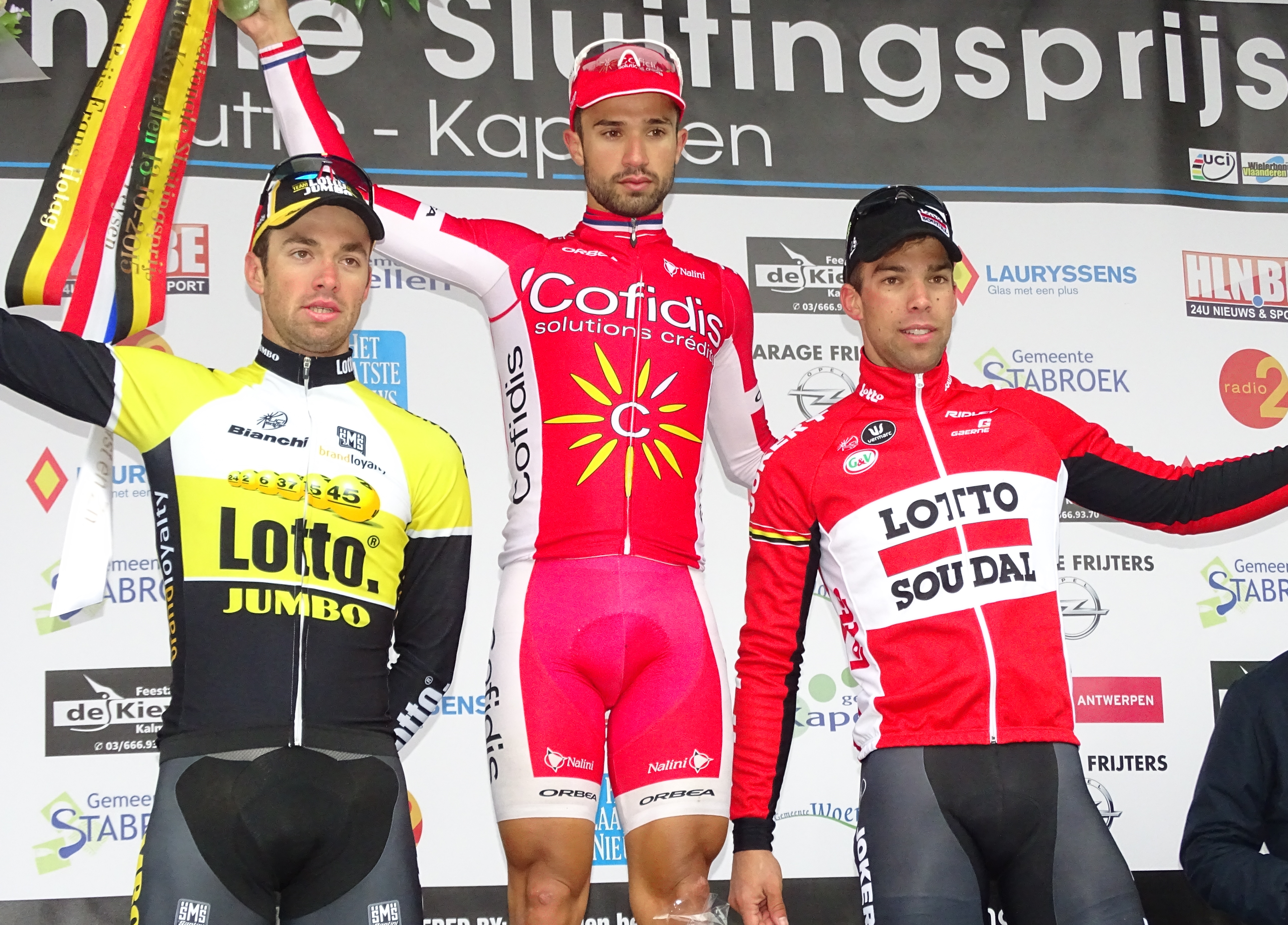 Reportage réalisé le mardi 13 octobre à l'occasion du départ et de l'arrivée du Prix national de clôture 2015 à Putte (Woensdrecht, Pays-Bas) et Putte-Kapellen (Kapellen, Belgique).